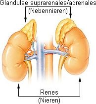 Nebenniere